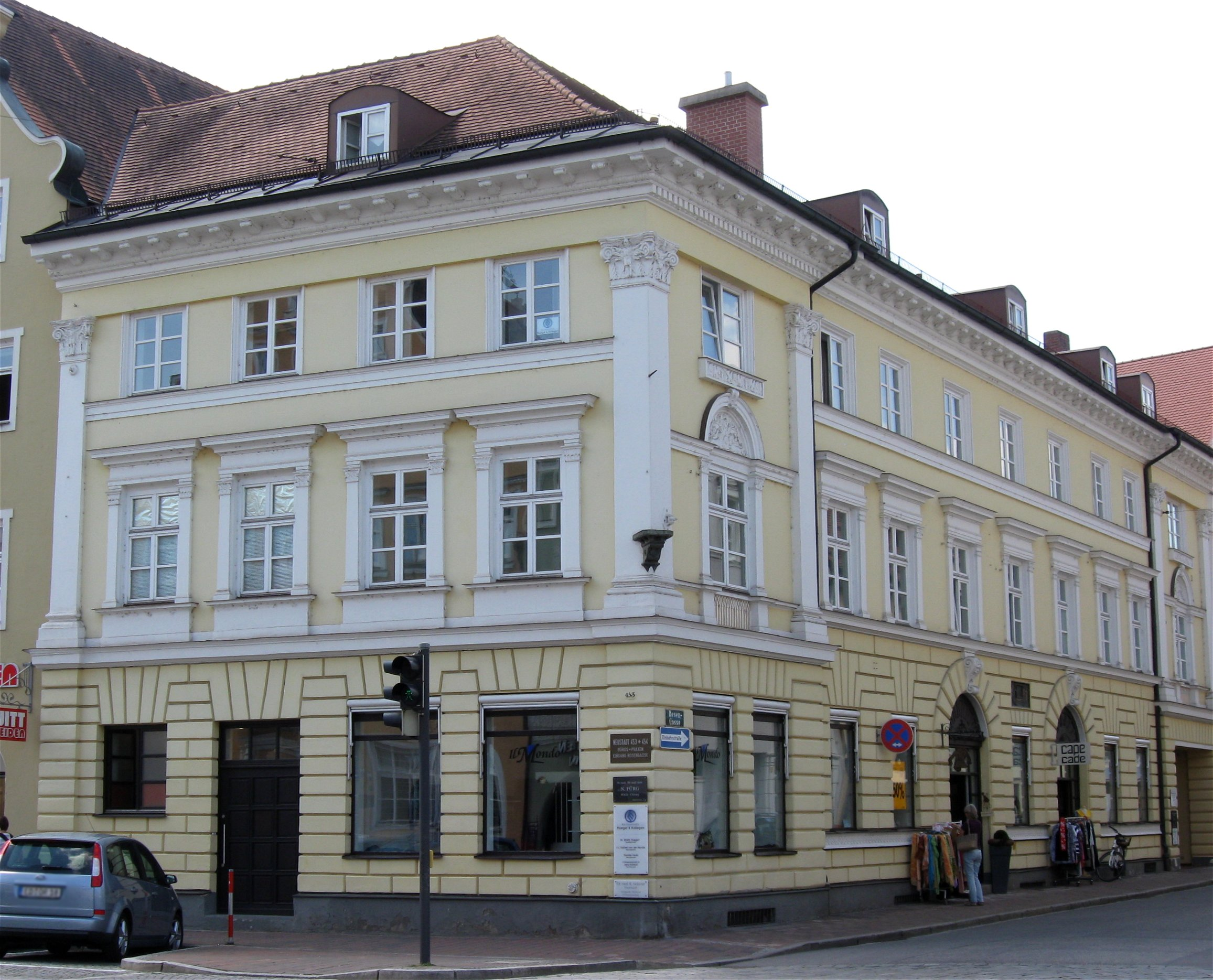 Neustadt 453; Wohn- und Geschäftshaus, dreigeschossiges Eckhaus von vier zu neun Achsen, klassizistisch, bez. 1830 von Johann Bernlochner; an der Hausecke Sandsteinfigur, Maria mit Kind